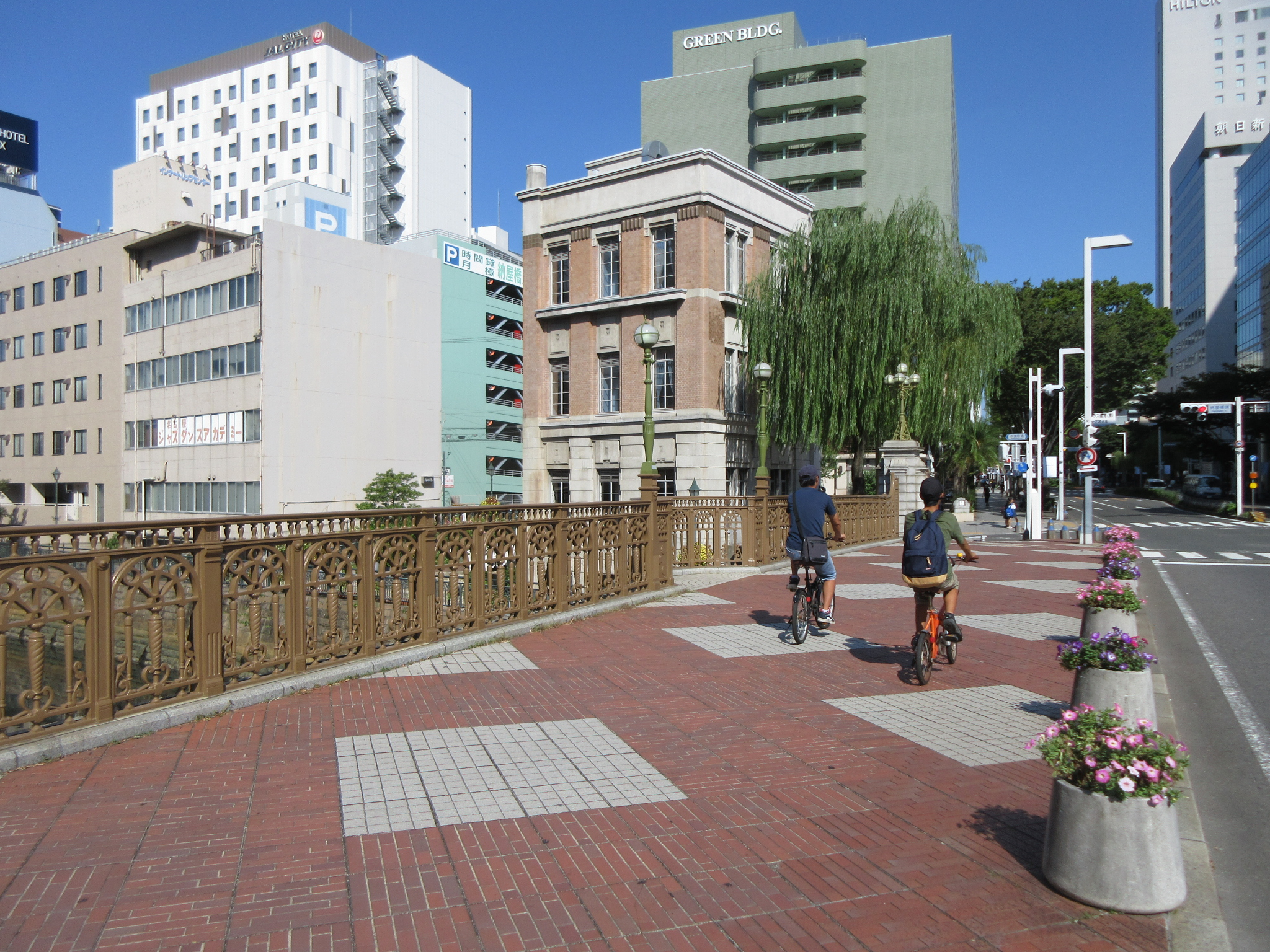 堀川にかかる納屋橋（名古屋市中村区）